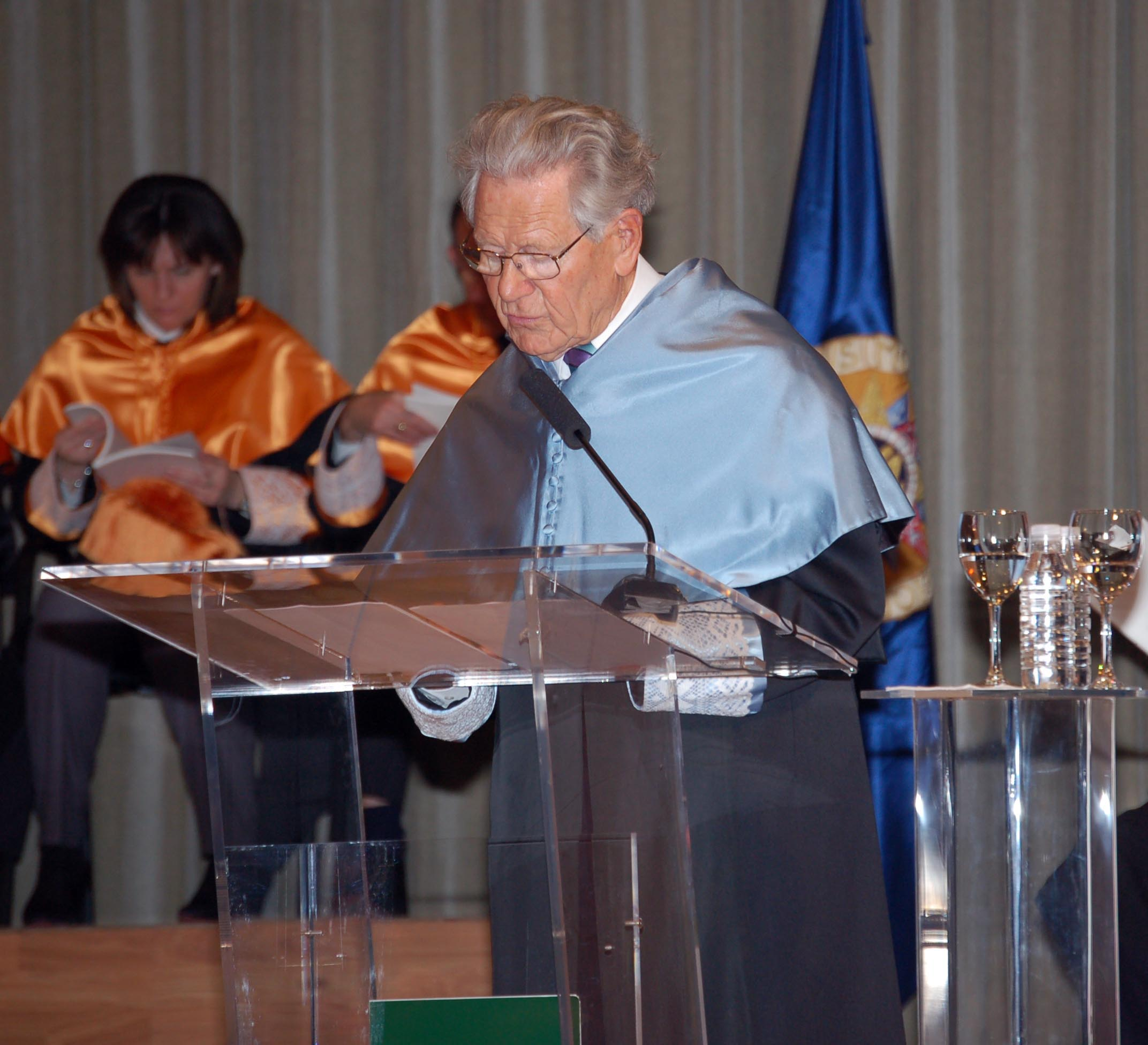 Hans Küng investido Doctor Honoris Causa en la Universidad Nacional de Educación a Distancia (UNED).